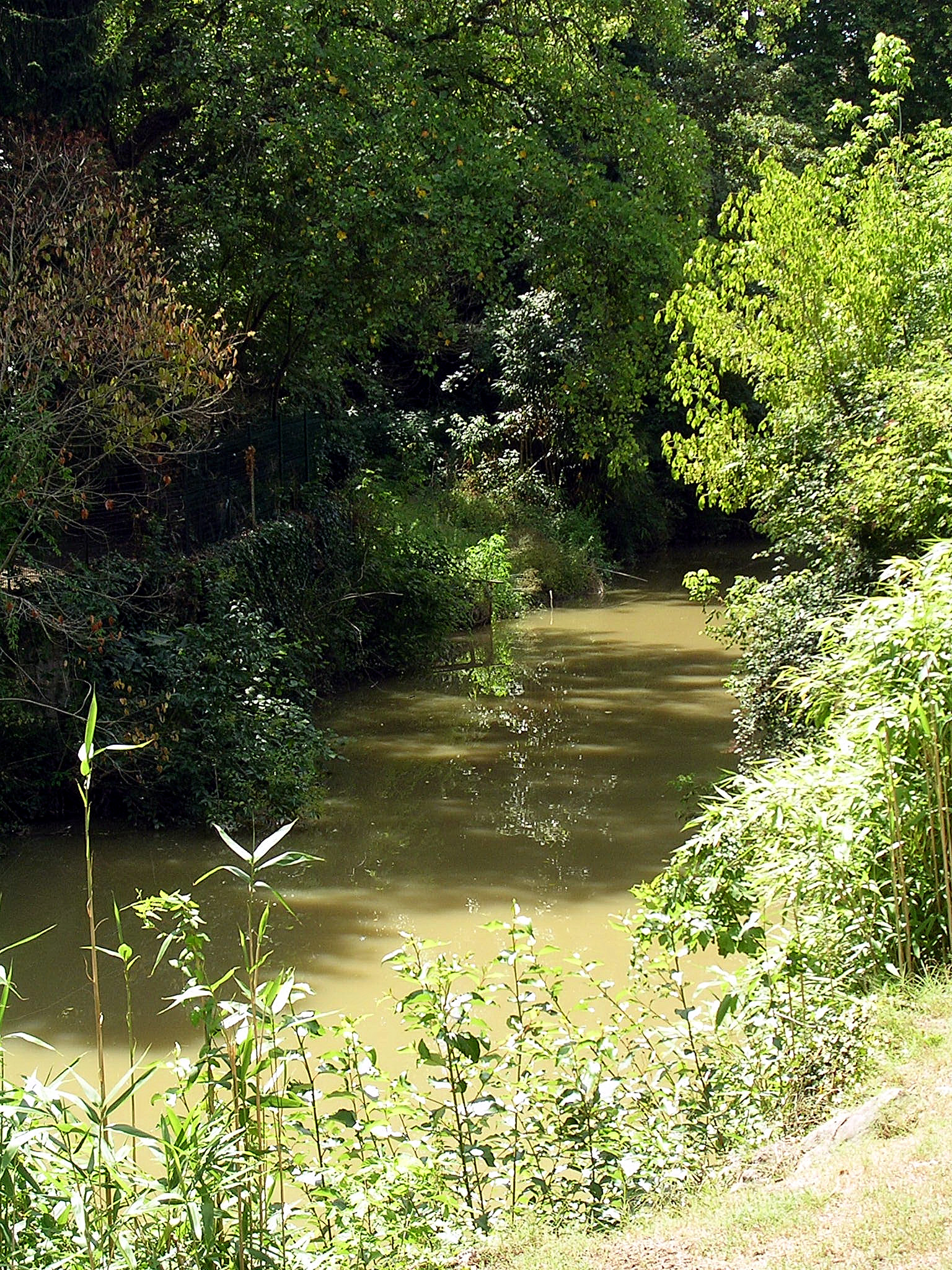 Mont-de-Marsan (Landes, France) - Le Midou à l'aval immédiat du donjon Lacataye.